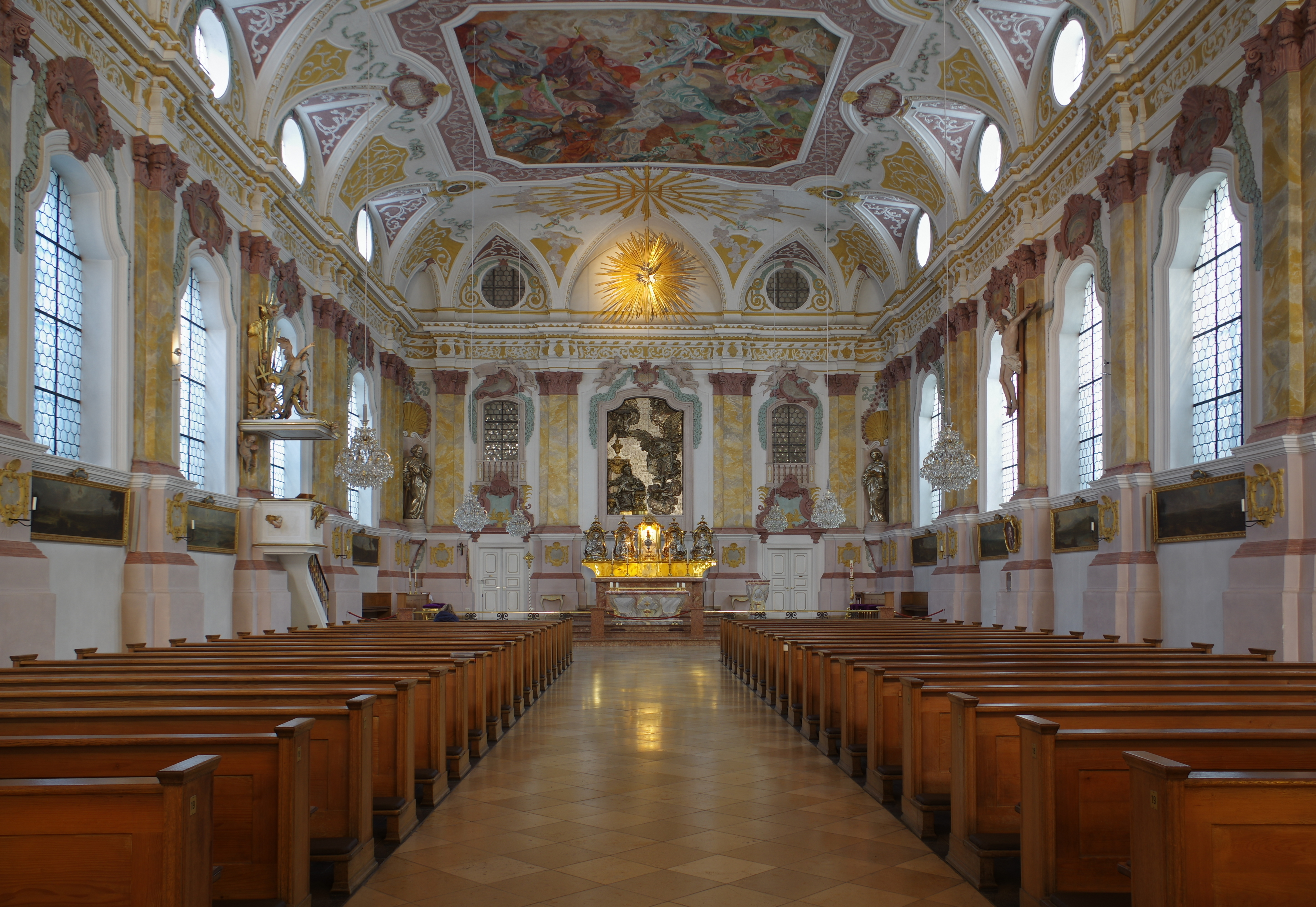 München,Neuhauser Straße 14, Bürgersaalkirche, Akten-Nr. D-1-62-000-4716